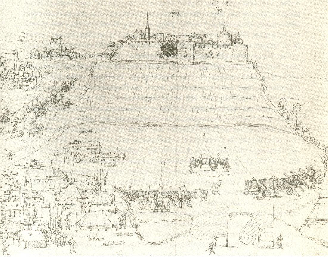 Hohenasperg: Belagerung 1519 durch Georg von Frundsberg im Krieg des Schwäbischen Bundes gegen Herzog Ulrich. Im Vordergrund Feldlager und Geschützstände bei Möglingen. Im Hintergrund links die Städte Grüningen (Markgröningen) und Pytika (Bietigheim). Federzeichnung von Albrecht Dürer Kupferstichkabinet, Berlin